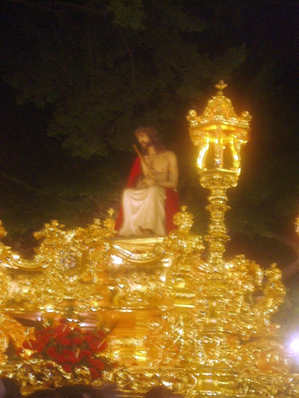 Trono y cristo de los Estudiantes